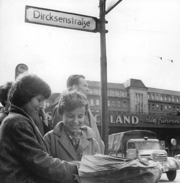 Berlin, Straßenszene Zentralbild Brüggmann Co. 16.8.1961 Auf dem Alex in Berlin: Gut gelaunt trotz schlechtem Wetter und tückischem Knirps.